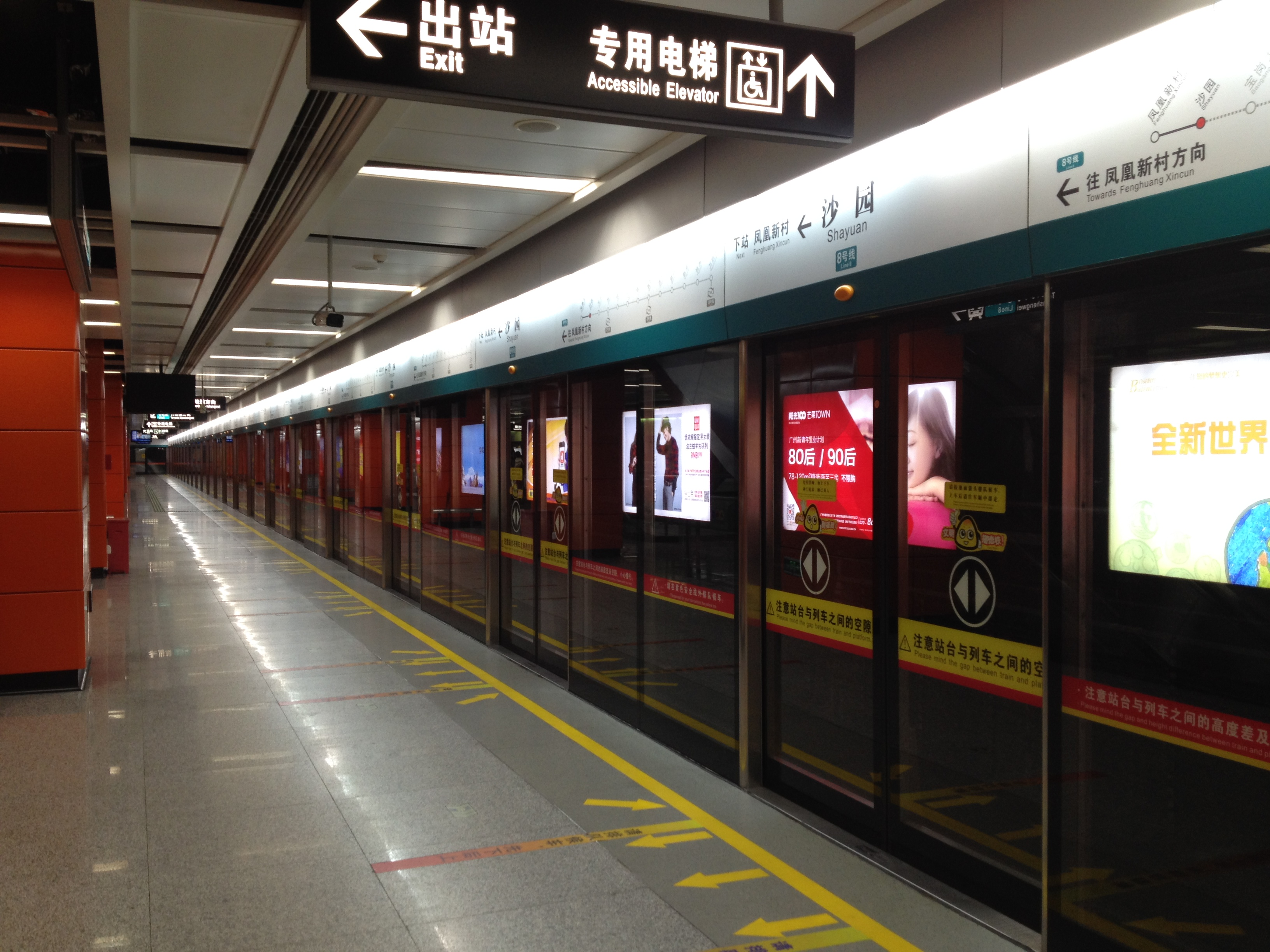 广州地铁8号线沙园站月台